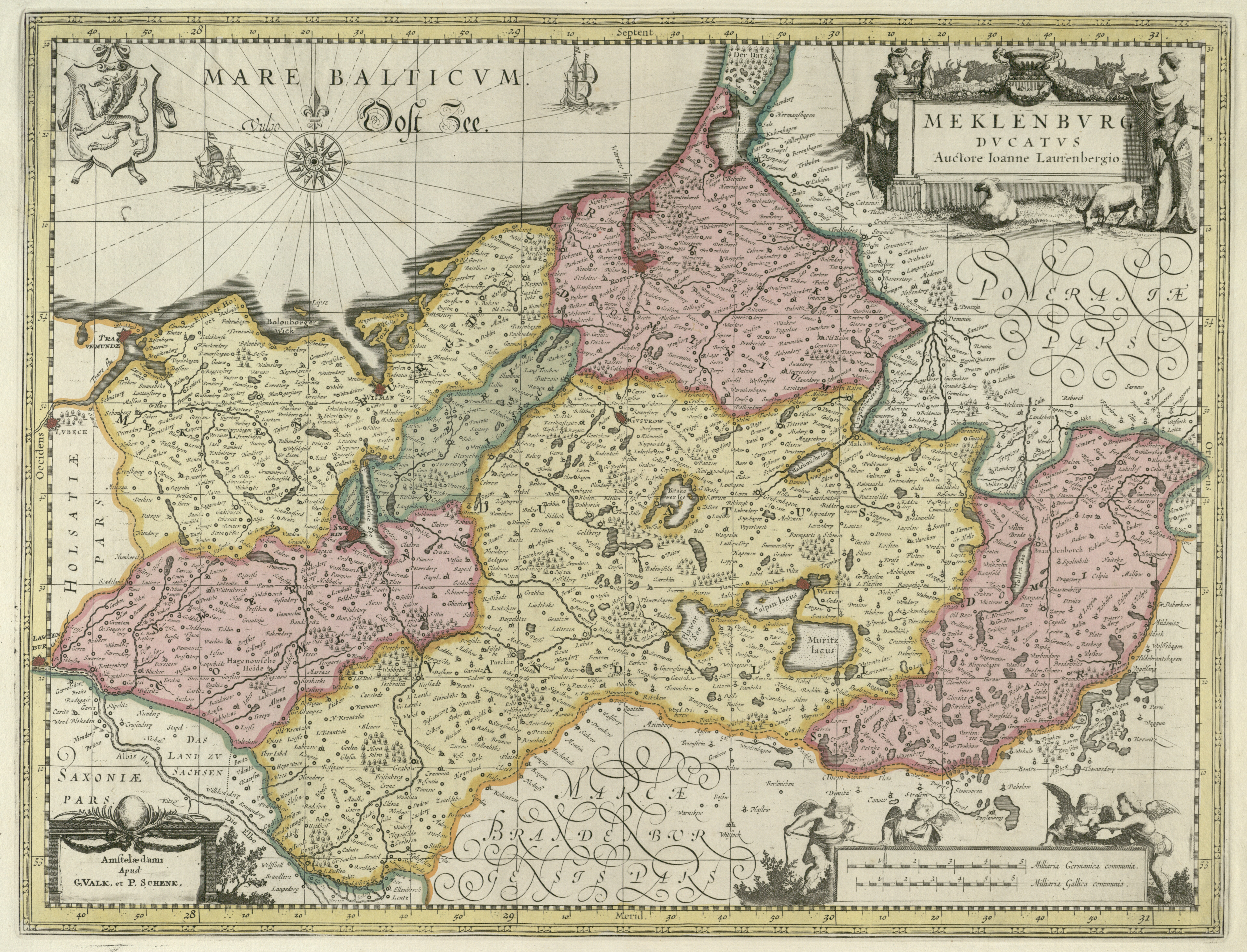 piblished: Amstelaedami : Apud G. Valk et P. Schenk, [1709?]